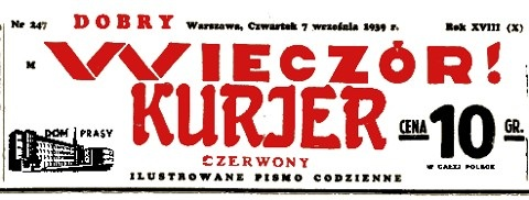 Winieta dziennika "Dobry Wieczór! Kurjer Czerwony"